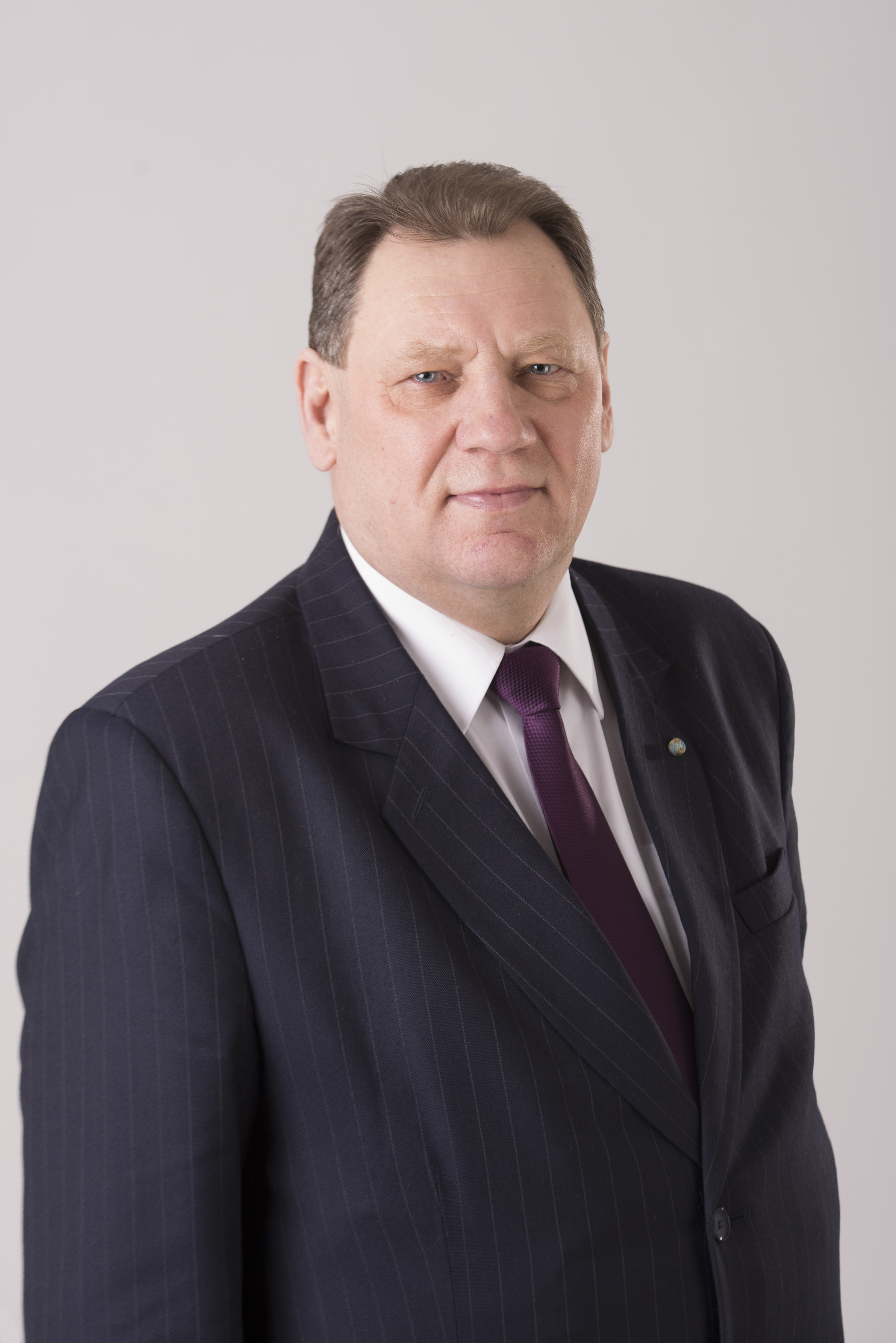 Juris Vectirāns